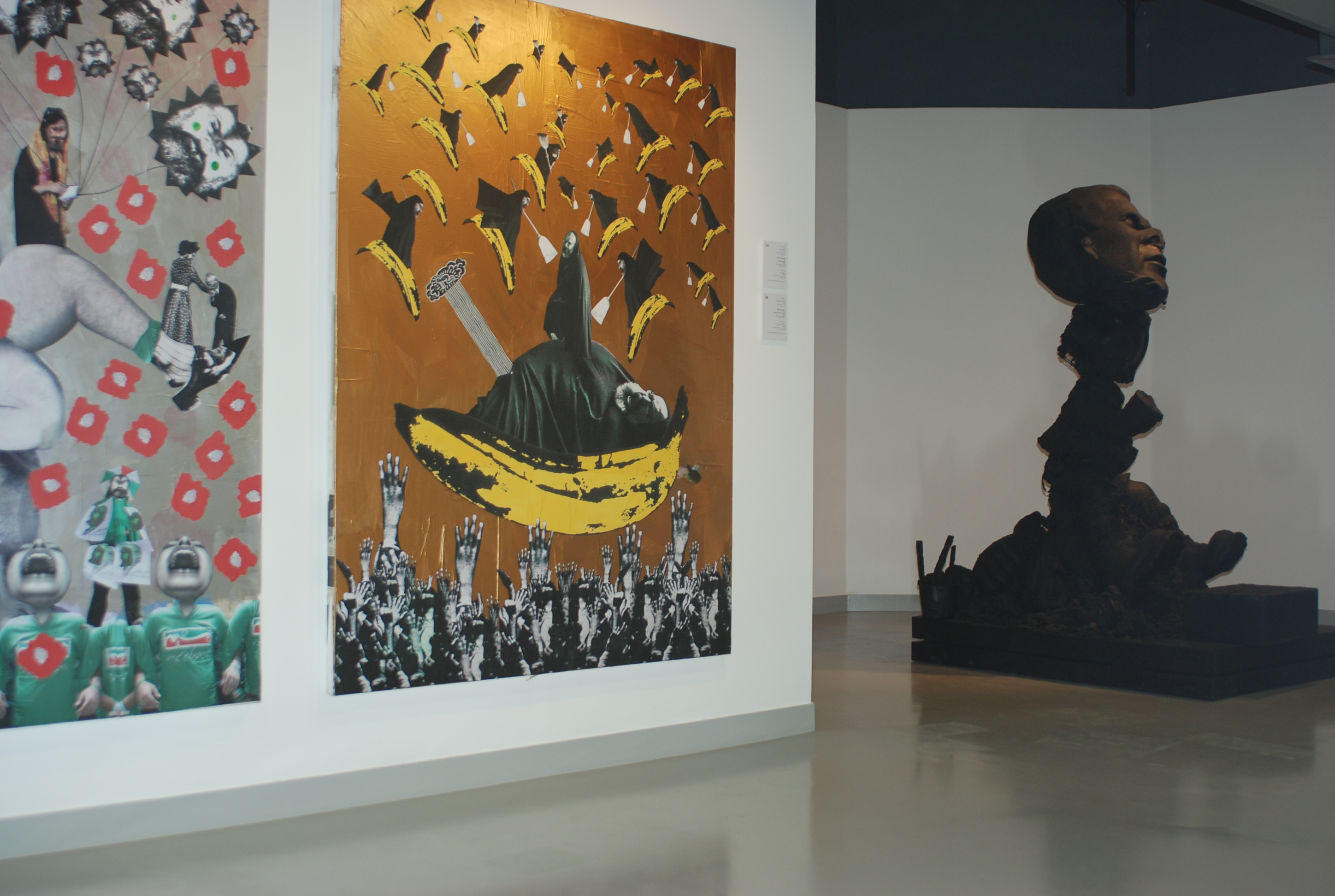 מוזיאון על התפר- פנים